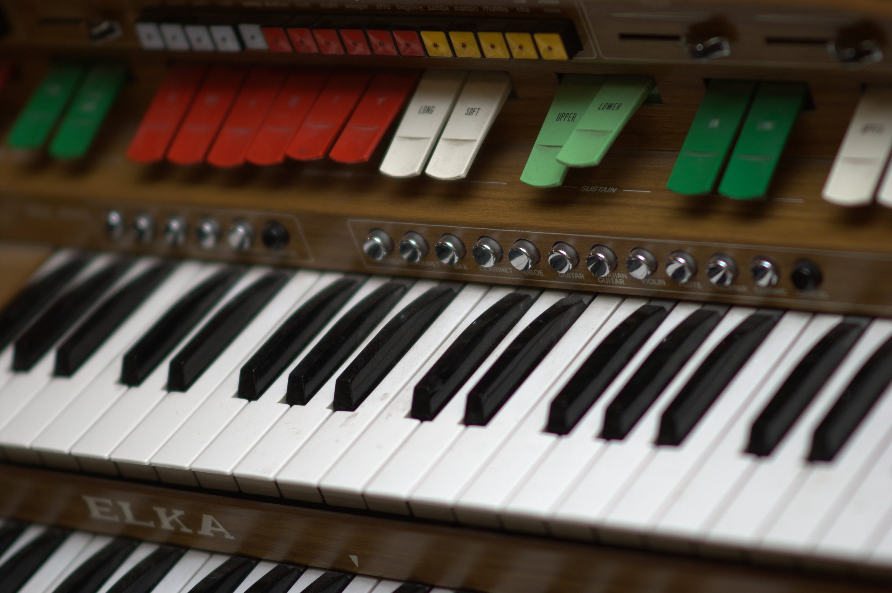 Elka Artist 606 Electronic Organ